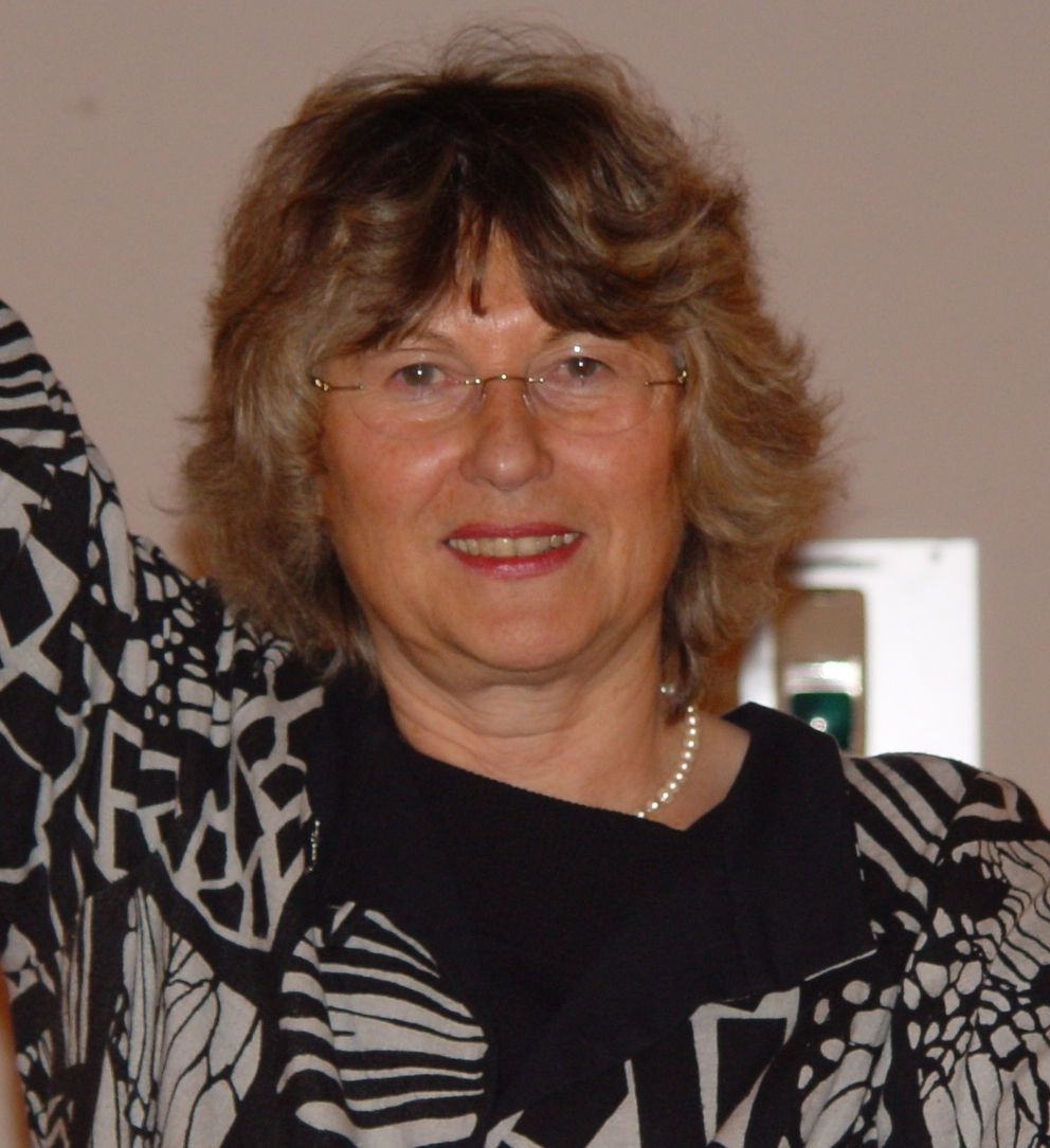 Professor Dr. Sigrid Metz-Göckel, Soziologin an der Technischen Universität Dortmund, während einer wissenschaftlichen Tagung